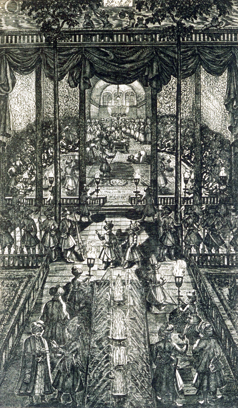 تاجگذاری شاه سلیمان به قلم انگلبرت کمپفر